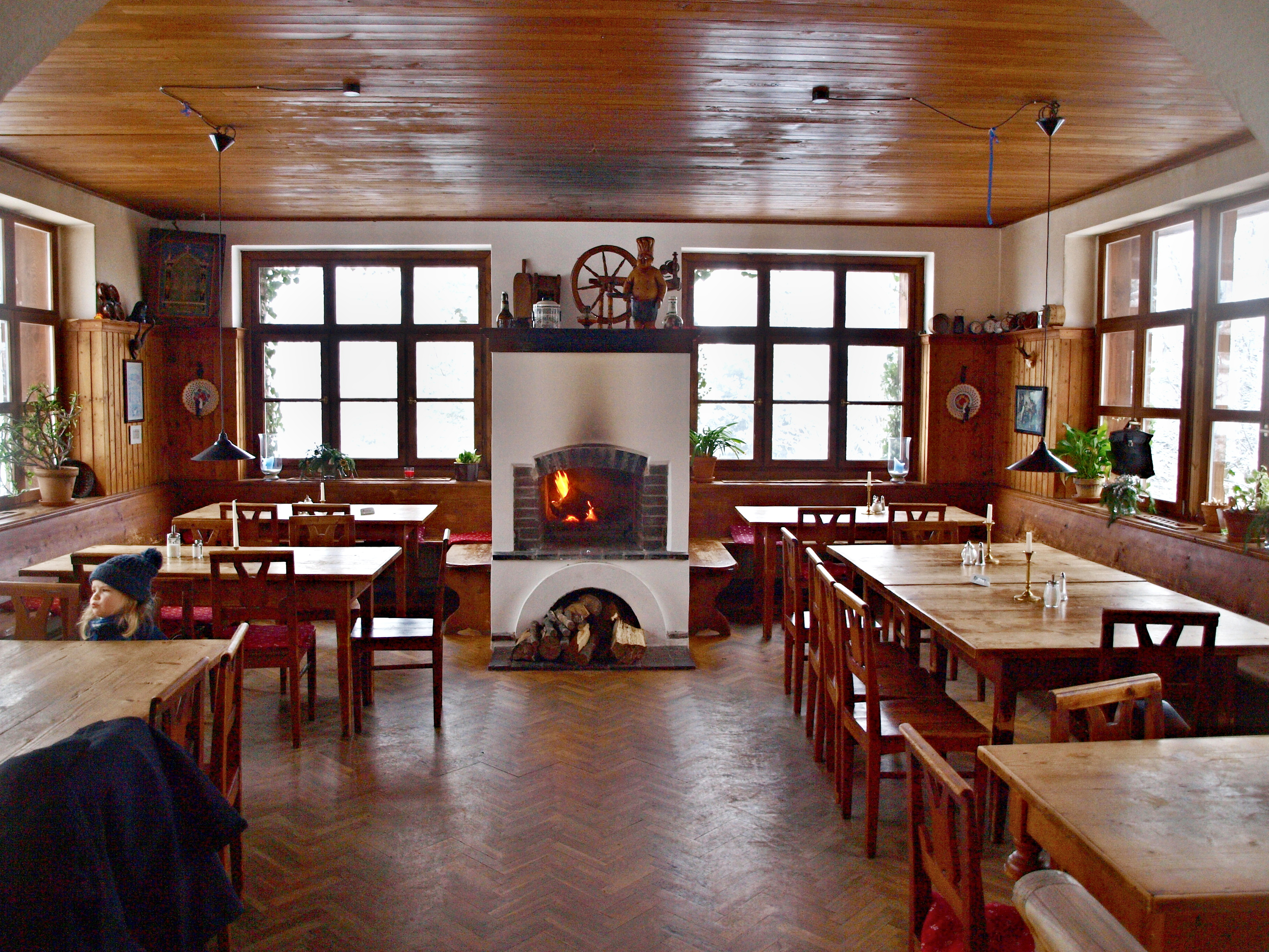 Krkonoše, Benecko